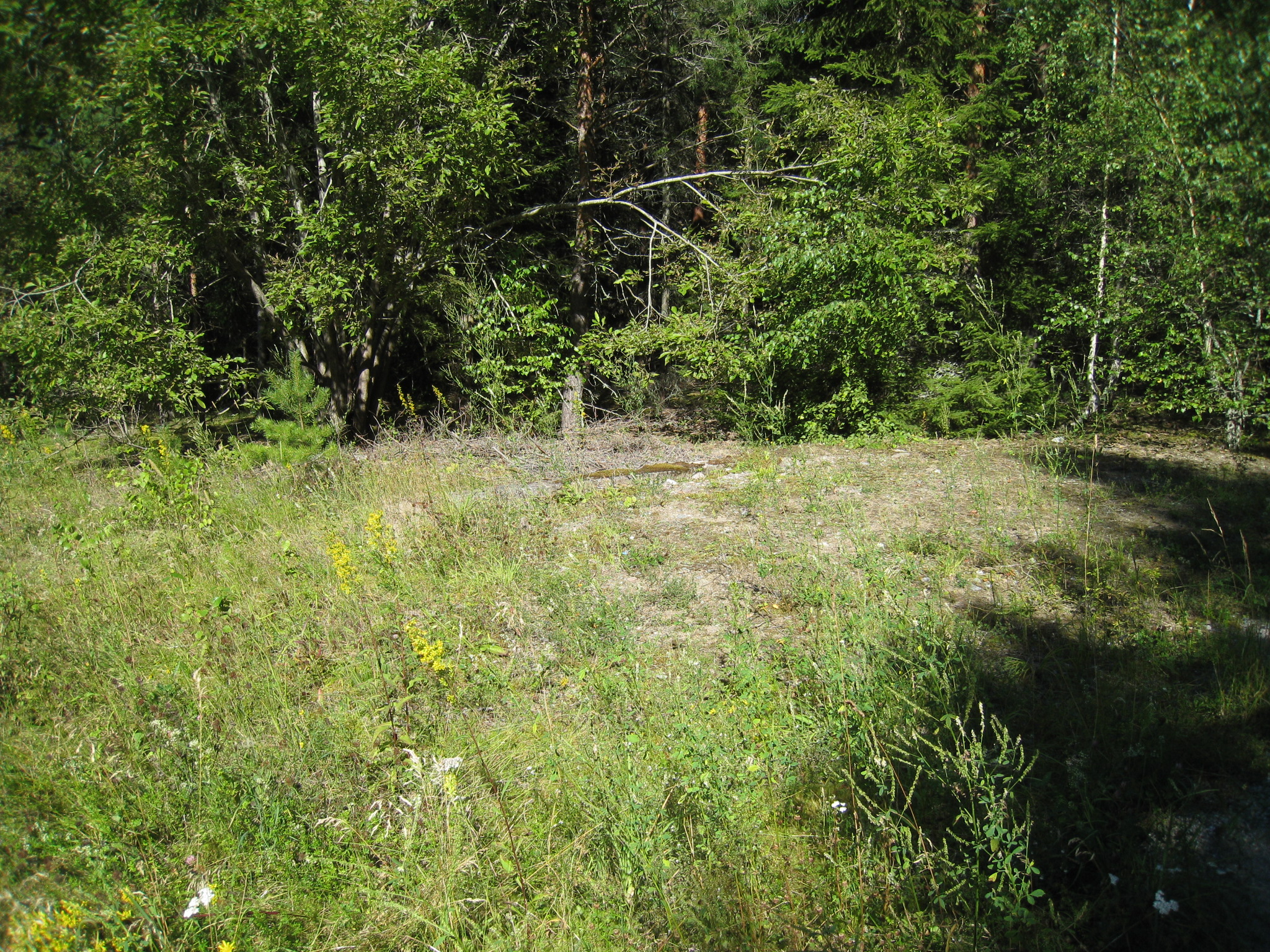 Platsen visar "Här låg Viksjö såg" åren 1963-1980 i Sandvik, Viksjö, Järfälla kommun. I terrängen finns fortfarande husgrunder kvar som visar var byggnaderna en gång låg.